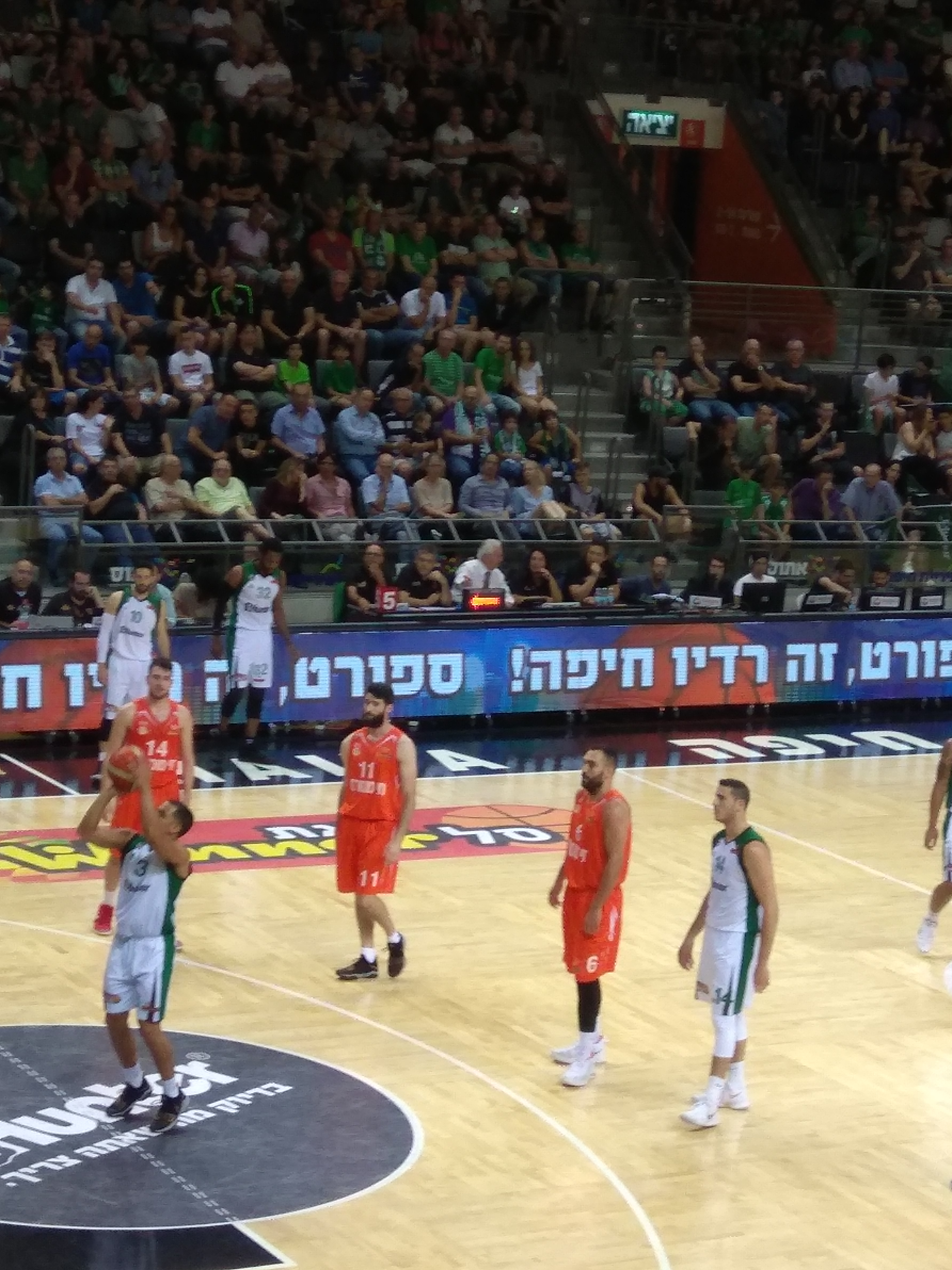 אלעד הופמן במדי עירוני נסציונה (מספר 11)